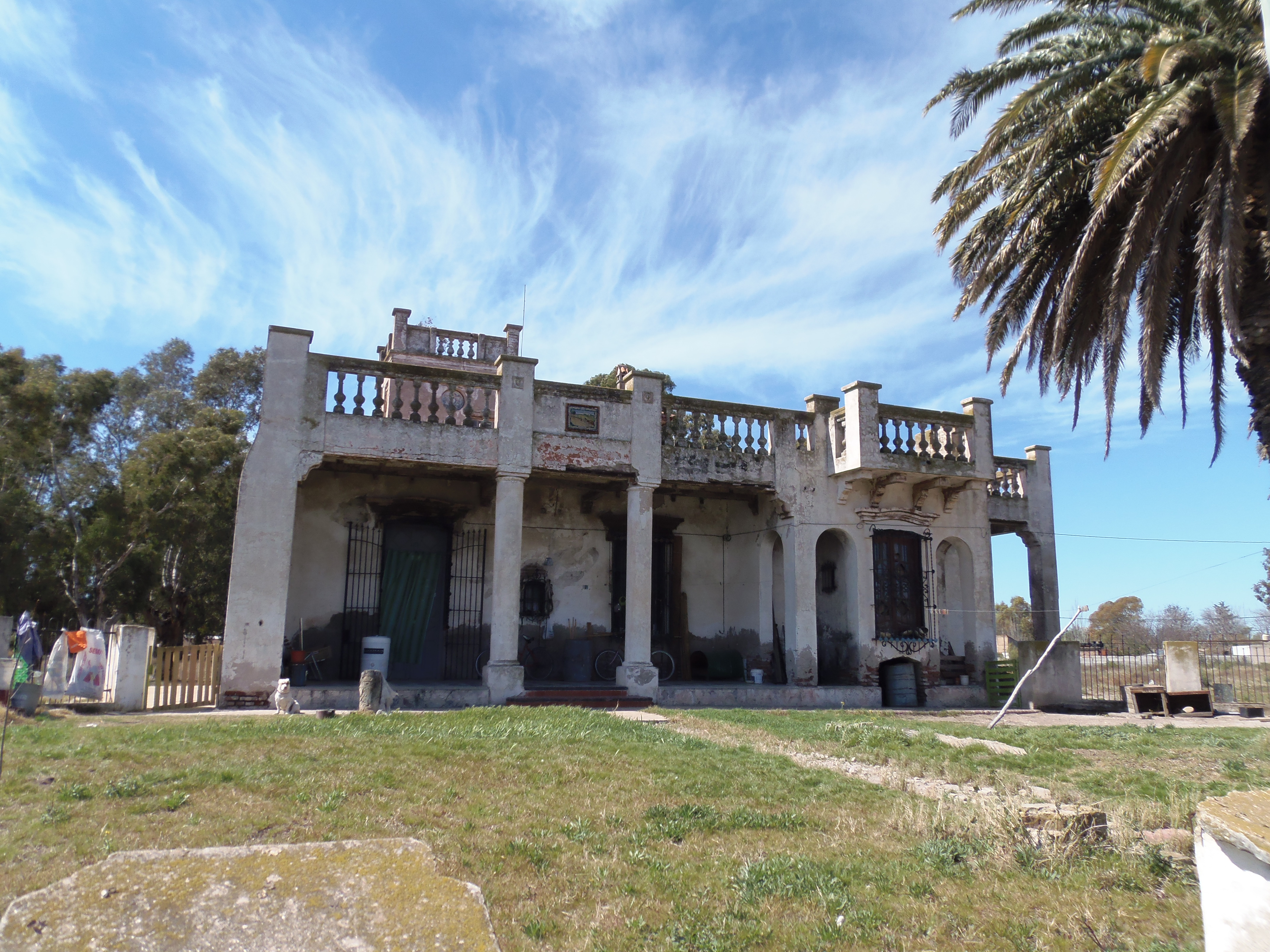 Casona en Villa Gral. Arias, data de principios del siglo pasado.